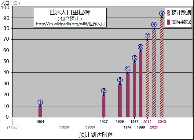 中文（中国大陆）: 世界人口里程碑